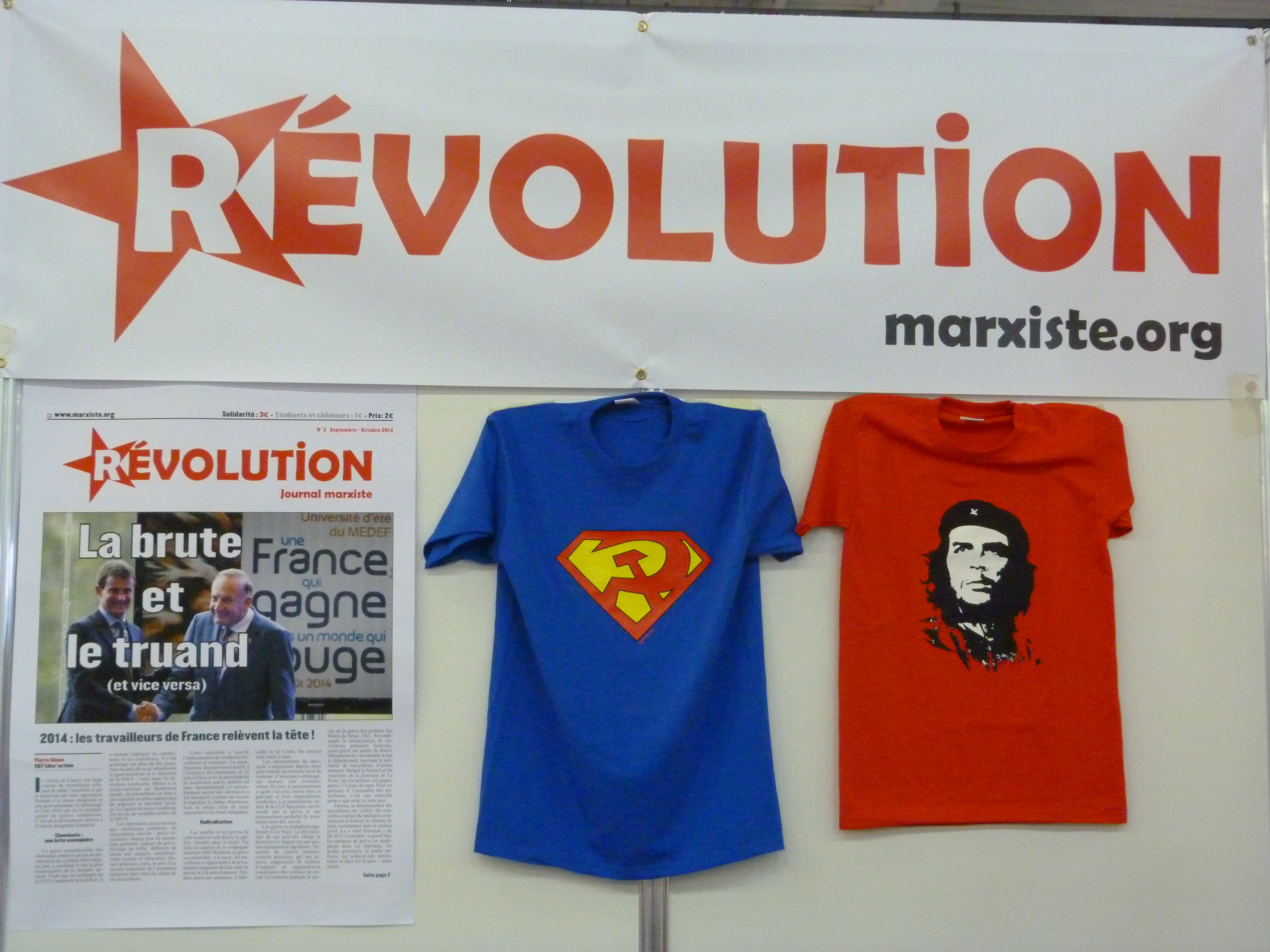 Stand de Révolution au village du livre, lors de la fête de l'humanité, en septembre 2014.